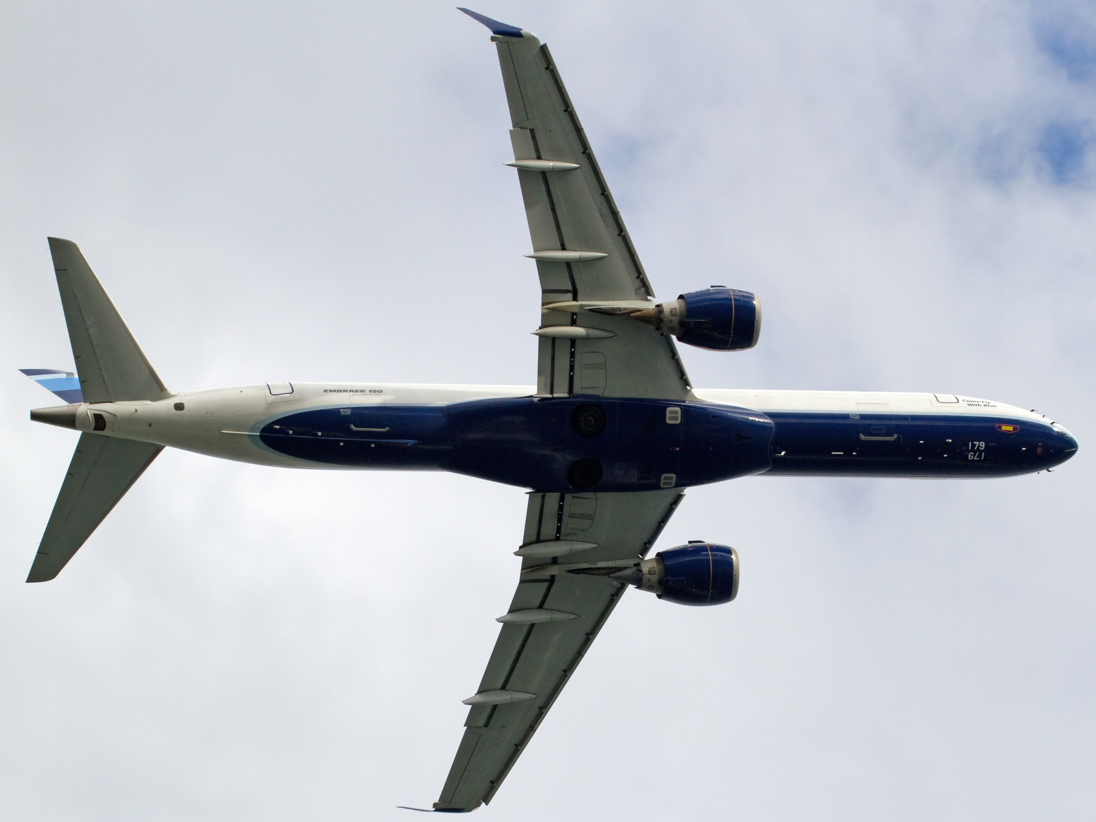 Embraer 190